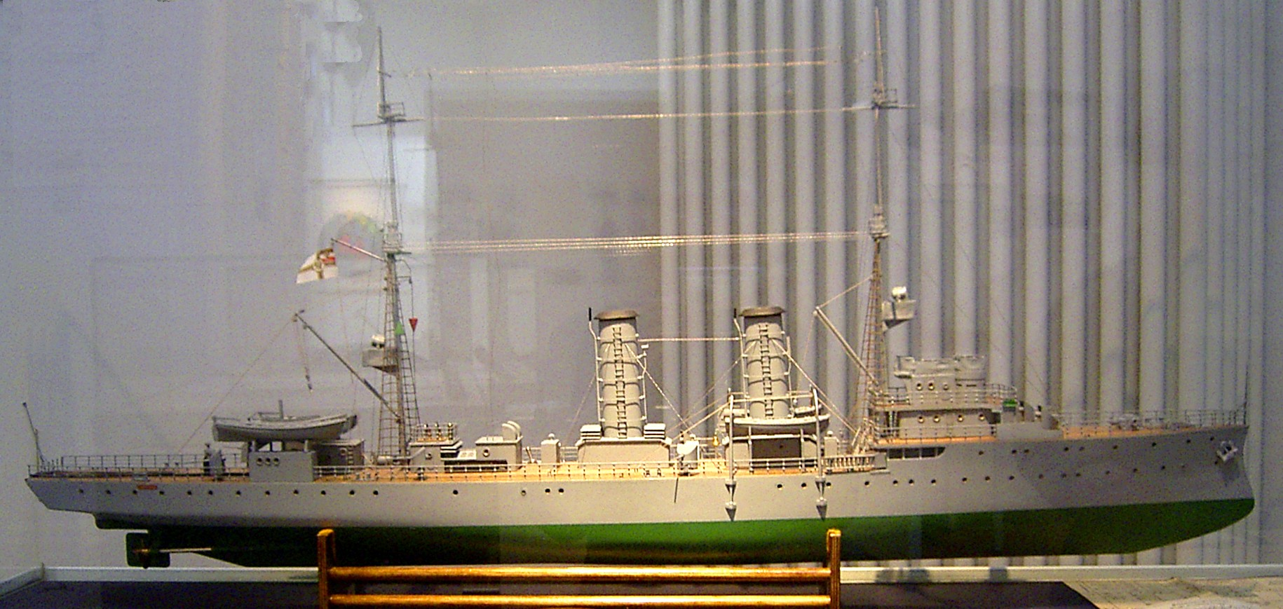 Modell (von Heinz Zimmermann) im Maßstab 1:100 des Minenkreuzers SMS Albatross im deutschen Marinemuseum in Wilhelmshaven.